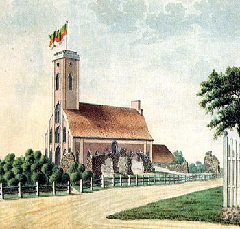 Markiis Paulucci joonistus 1830ndast aastast.